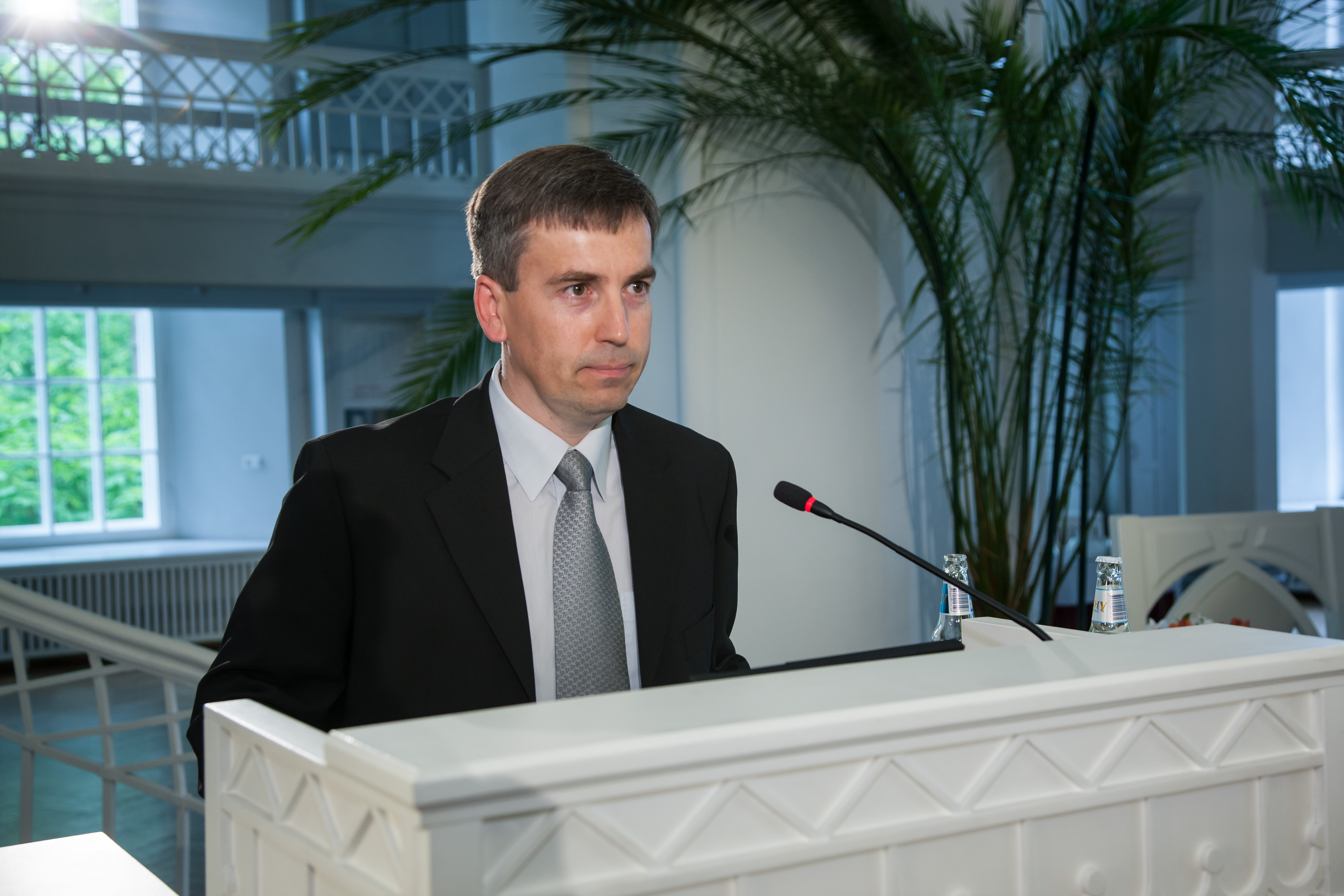 29. mail 2012 pidas Tartu Ülikooli keskkonnatehnoloogia professor Jaak Truu TÜ ajaloo muuseumi valges saalis inauguratsiooniloengu teemal "Keskkonna- ja biotehnoloogia: uued võimalused keskkonnaseisundi parandamiseks".